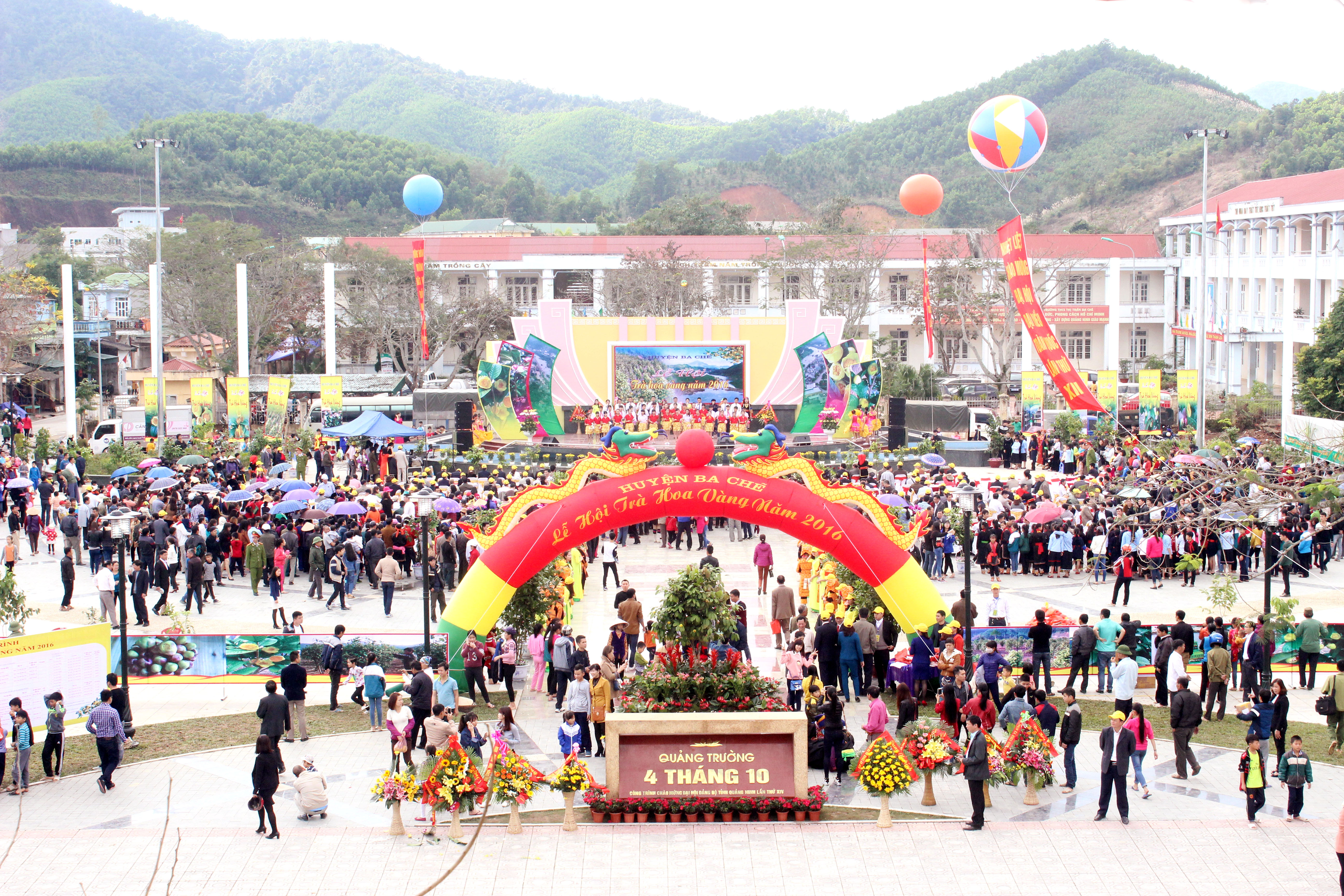 Lễ hội quảng bá các sản phẩm tiêu biểu của huyện Ba Chẽ